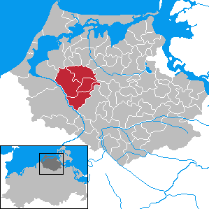 Former Amt Ahrenshagen in Mecklenburg-Vorpommern - District Nordvorpommern